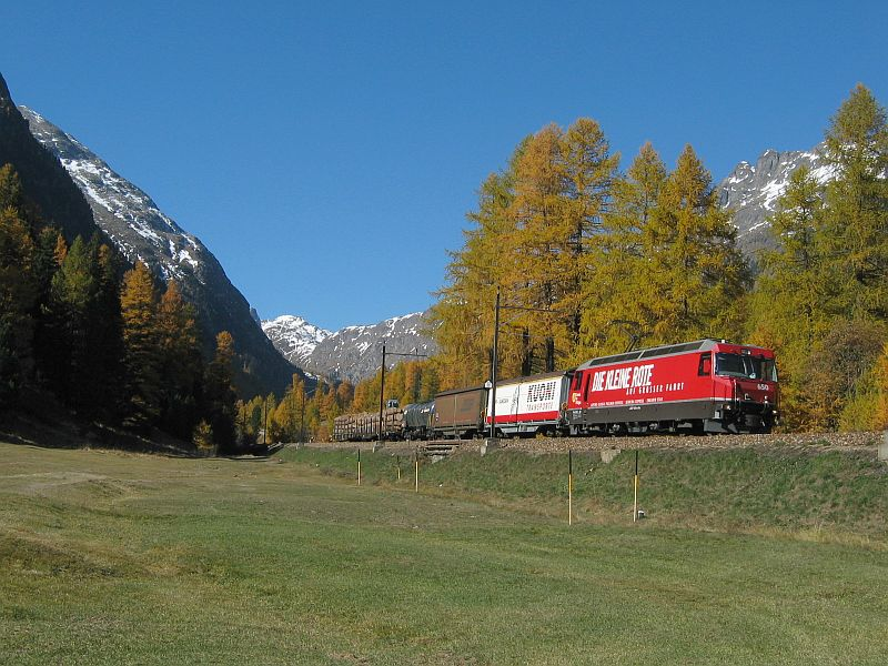 Zug 5537 der Rhätischen Bahn bei Bever (CH-GR)